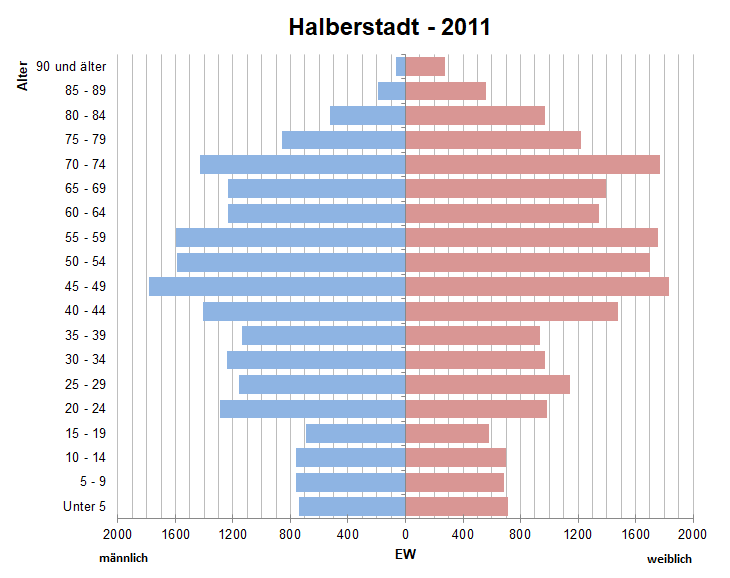 Bevölkerungspyramide der Stadt Halberstadt nach Zensus 2011.